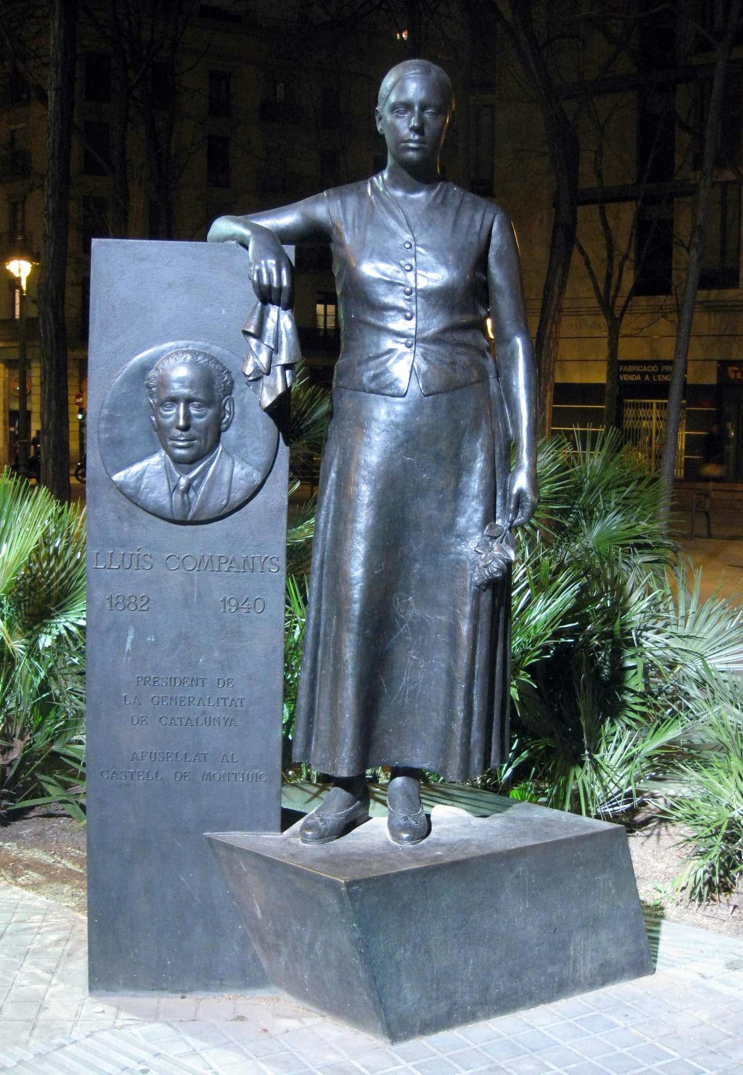 A Lluís Companys (Francisco López Hernández). Pg. de Lluís Companys amb Ronda de Sant Pere (Barcelona)